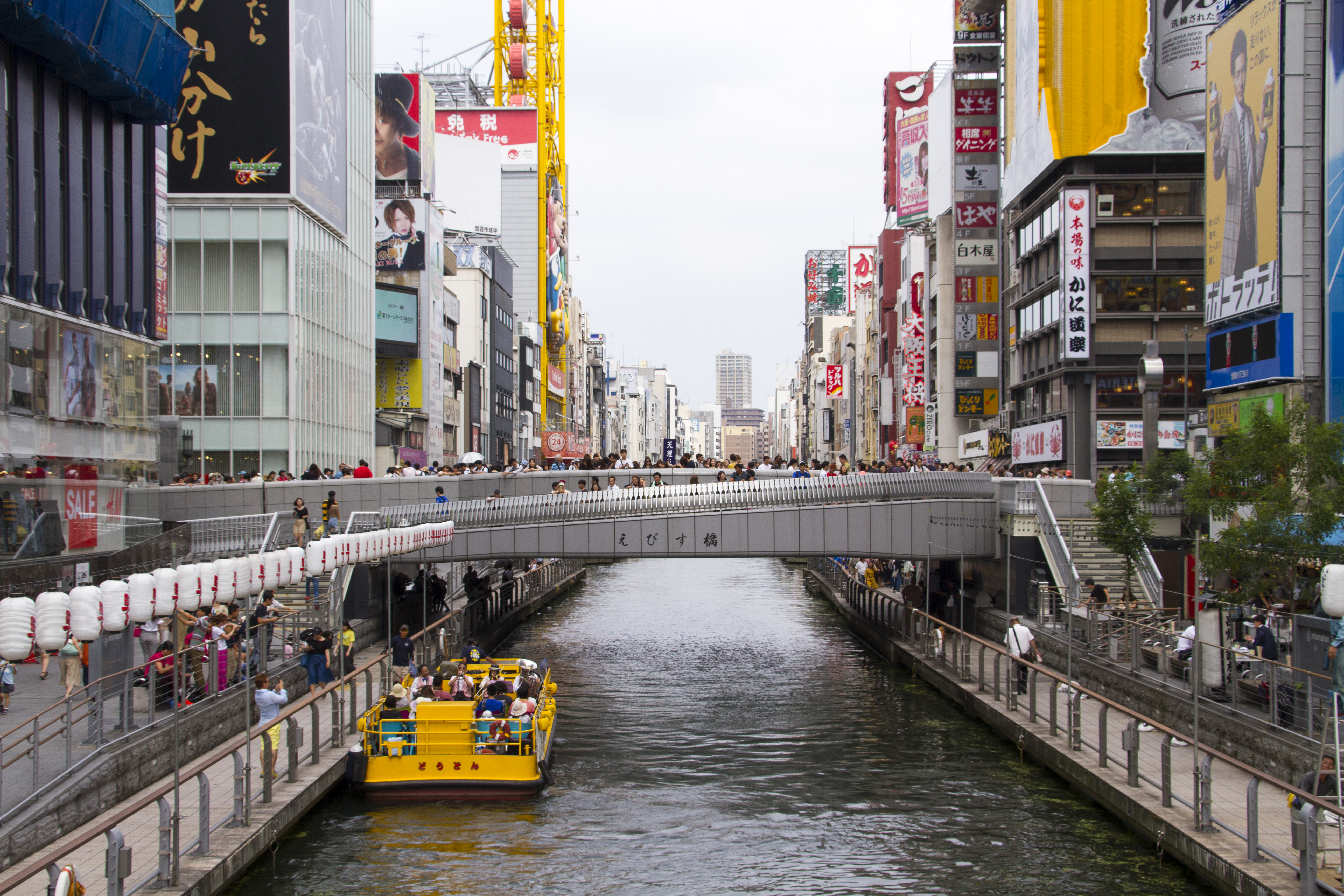 2017年06月25日道頓堀橋より撮影。